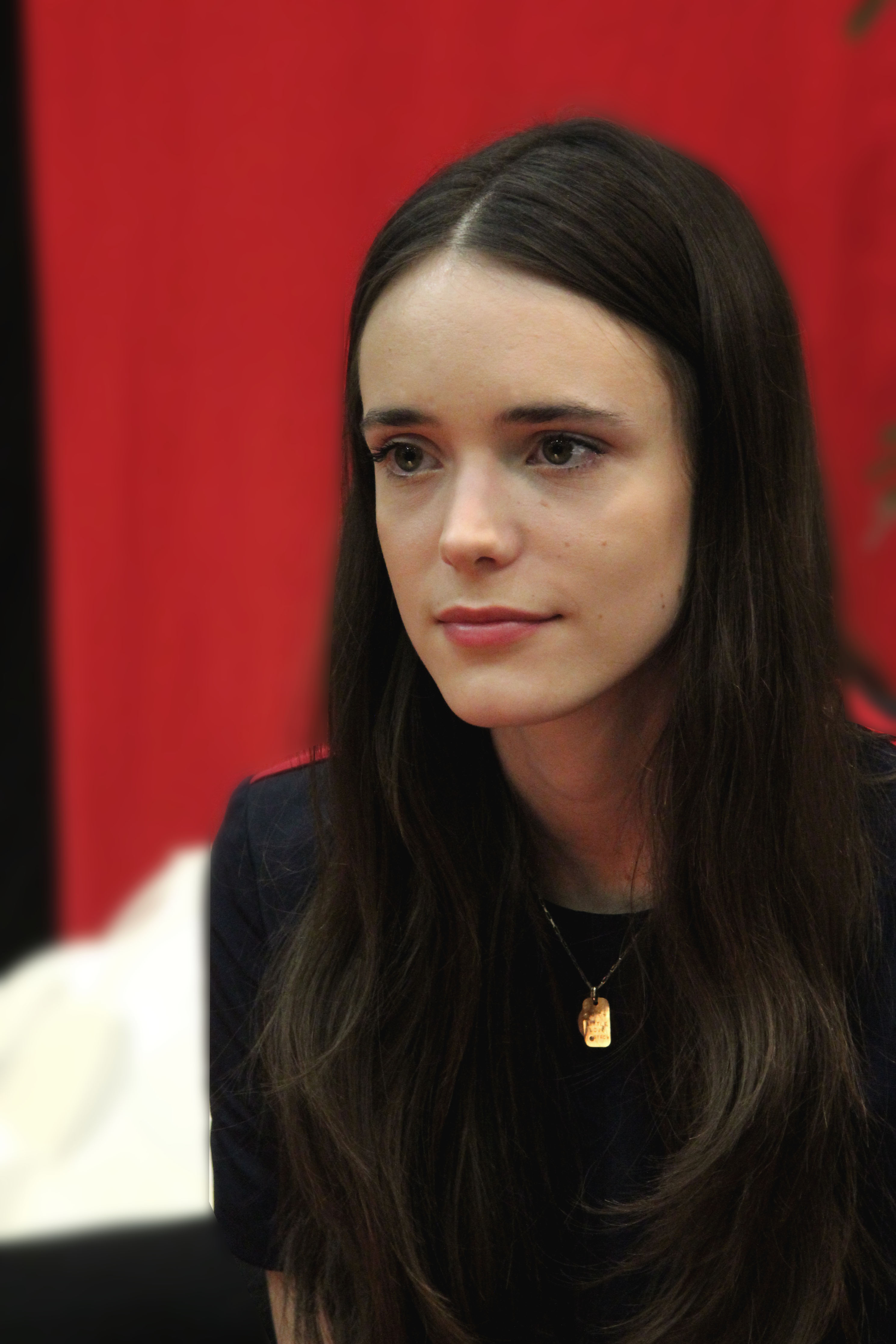 Stacy Martin en janvier 2014 pendant le festival Premiers Plans d'Angers.